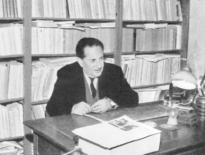 Quintino Cataudella (Scicli, 4 dicembre 1900 – Catania, 6 luglio 1984), filologo, latinista e grecista.